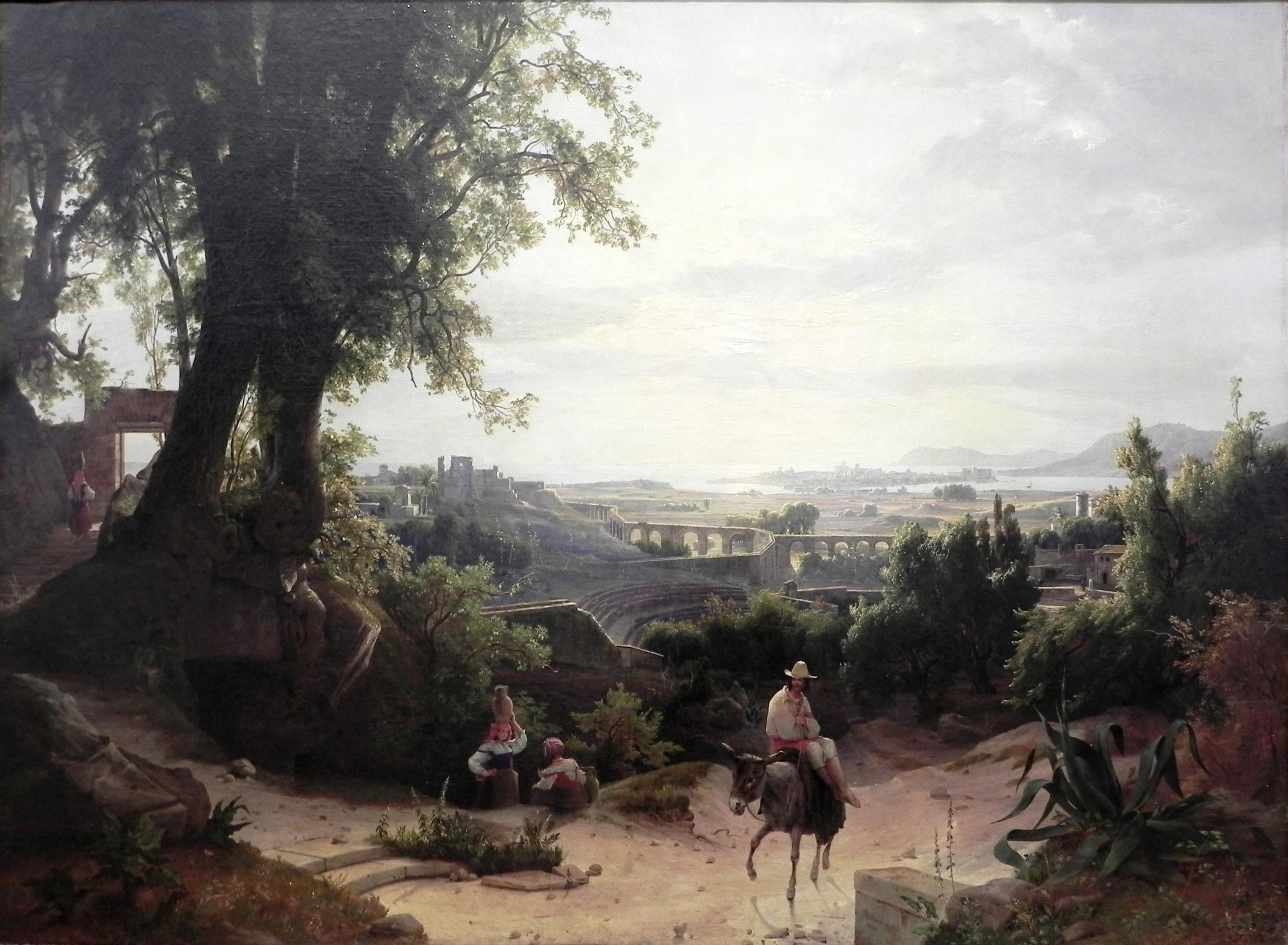 Syrakus bei Morgenbeleuchtung